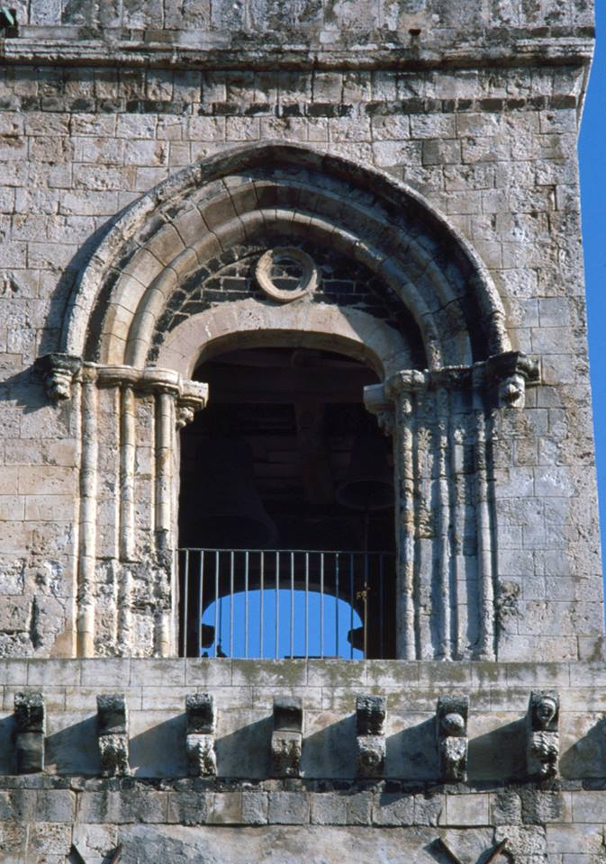 Particolare campanile, chiesa dell'Annunziata